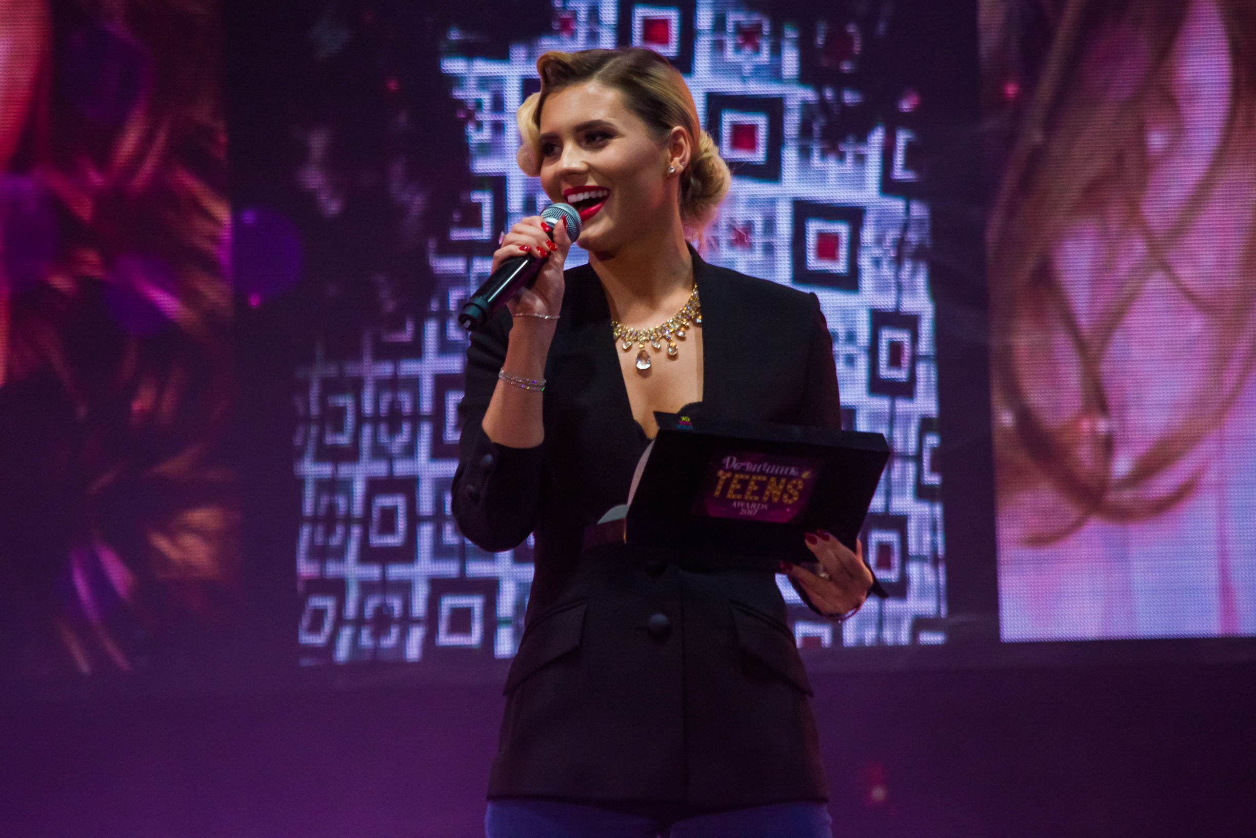 Анна Шульгина на Девичник Teens 2017